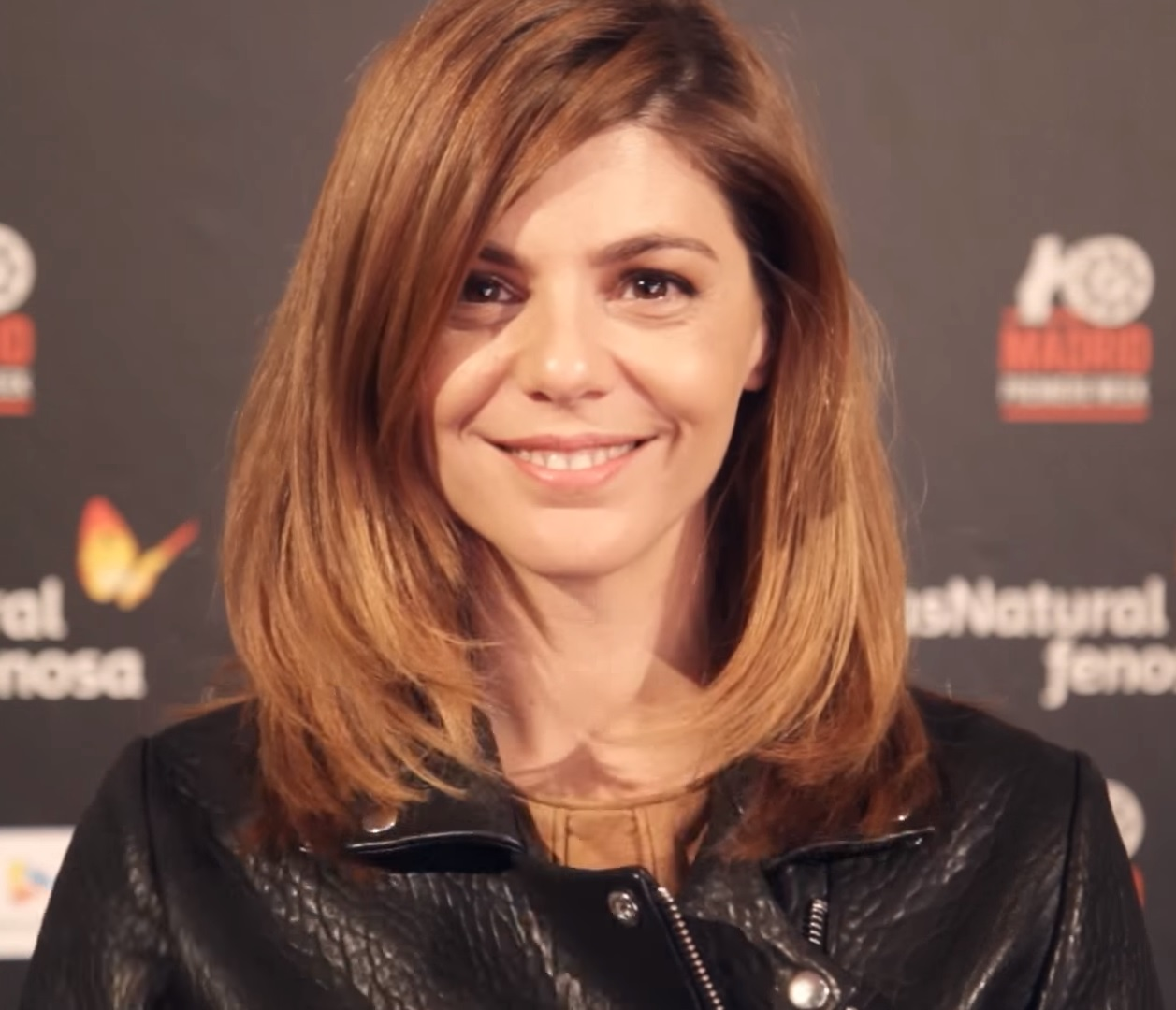 La actriz española Manuela Velasco en 2014.